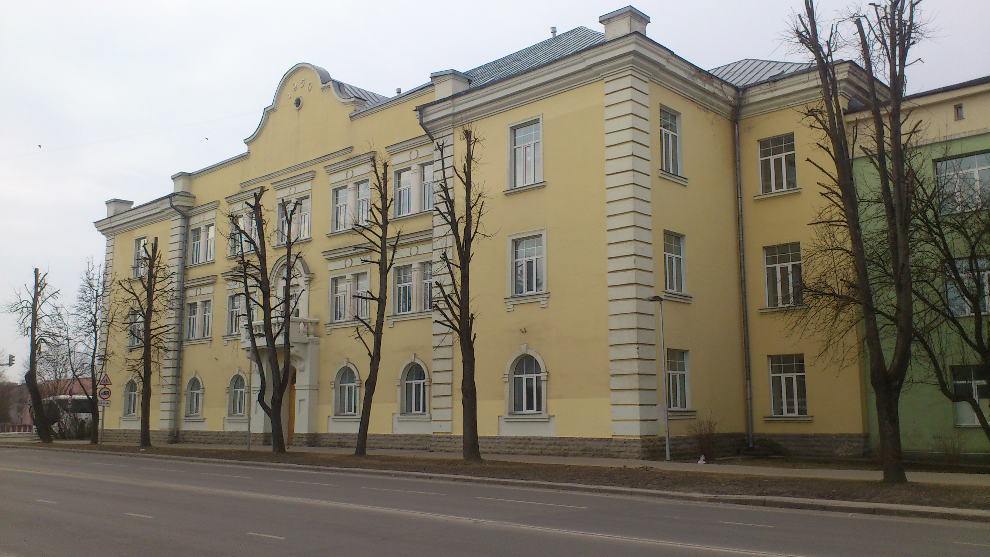 Narva Kesklinna gümnaasium